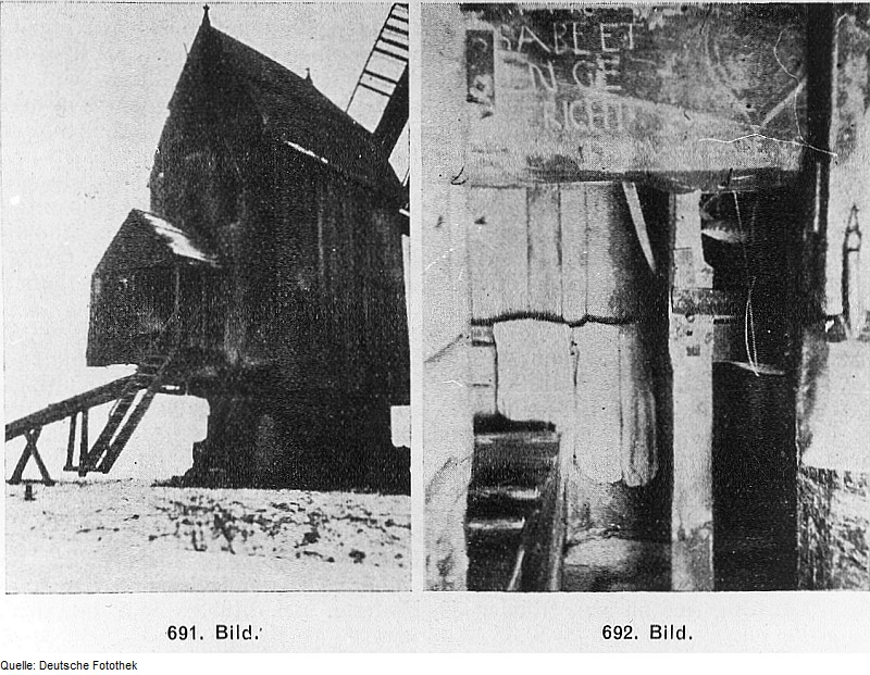 Original image description from the Deutsche FotothekStendal-Staffelde. Windmühle aus: Die Mühle vom 8. Sept. 1932